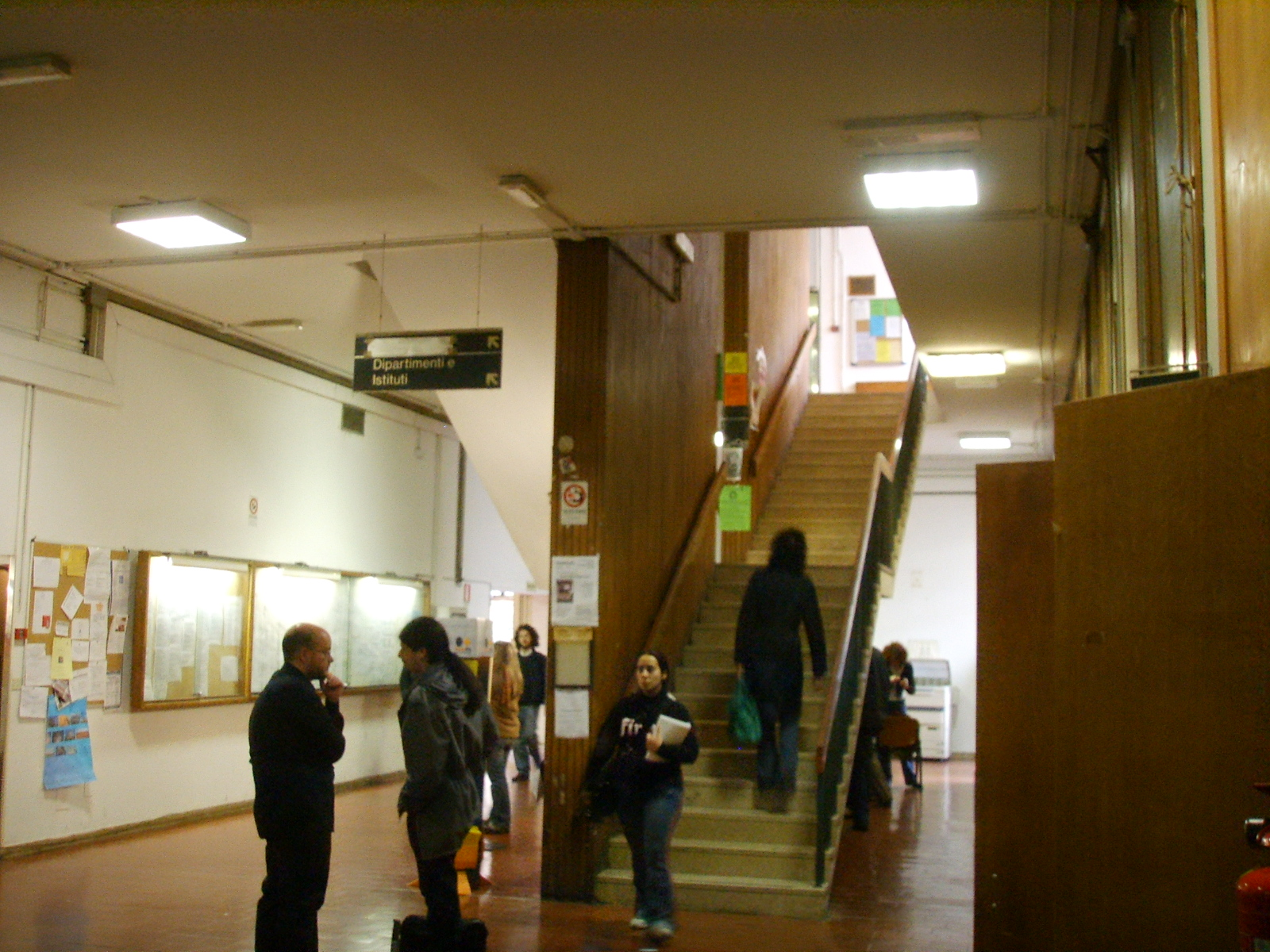 Facoltà di lettere e filosofia, scala